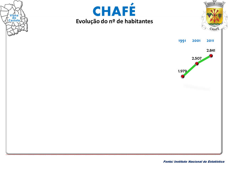 Censos 1864/2011